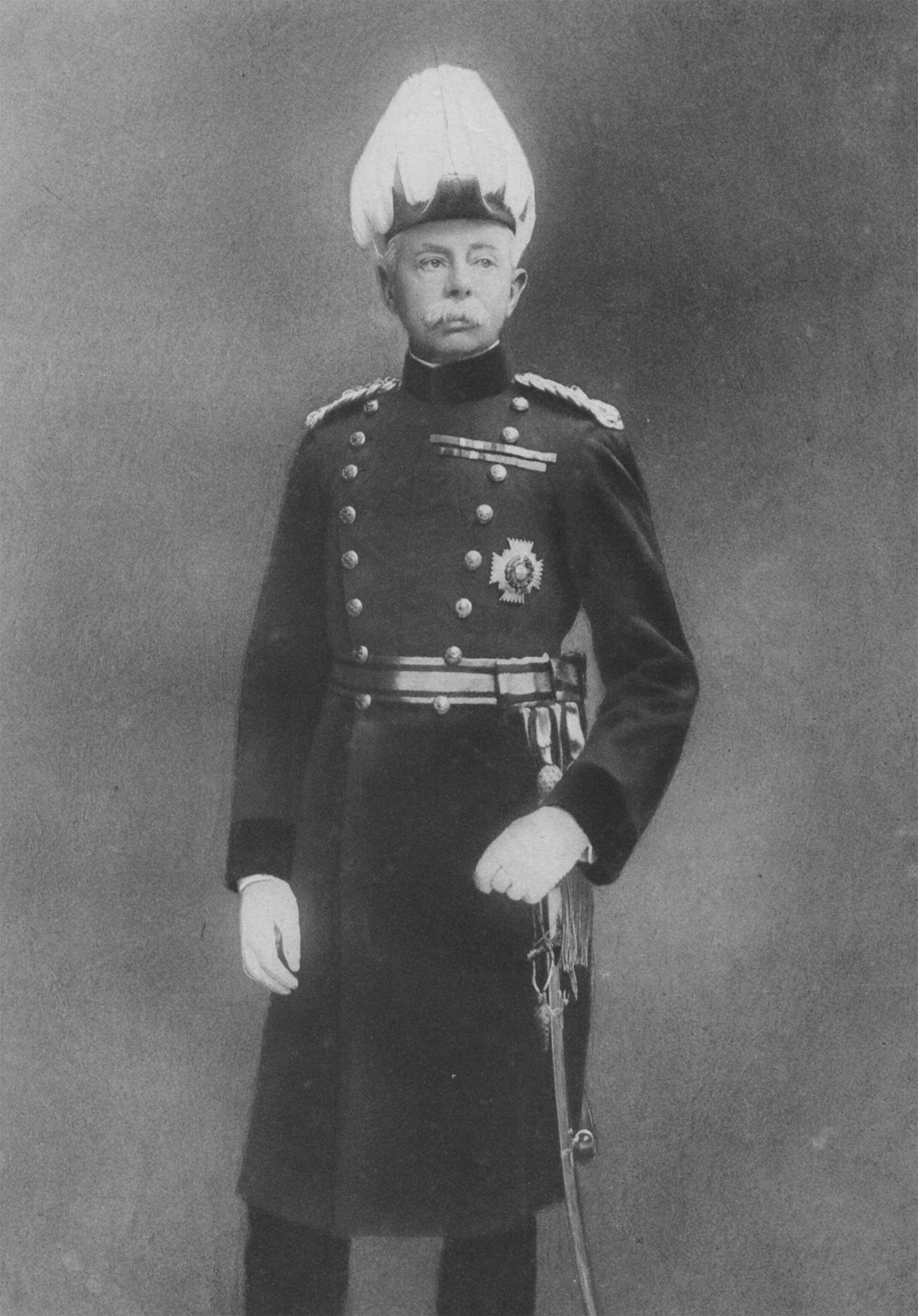 General Sir Herbert Plumer, 1st Viscount Plumer